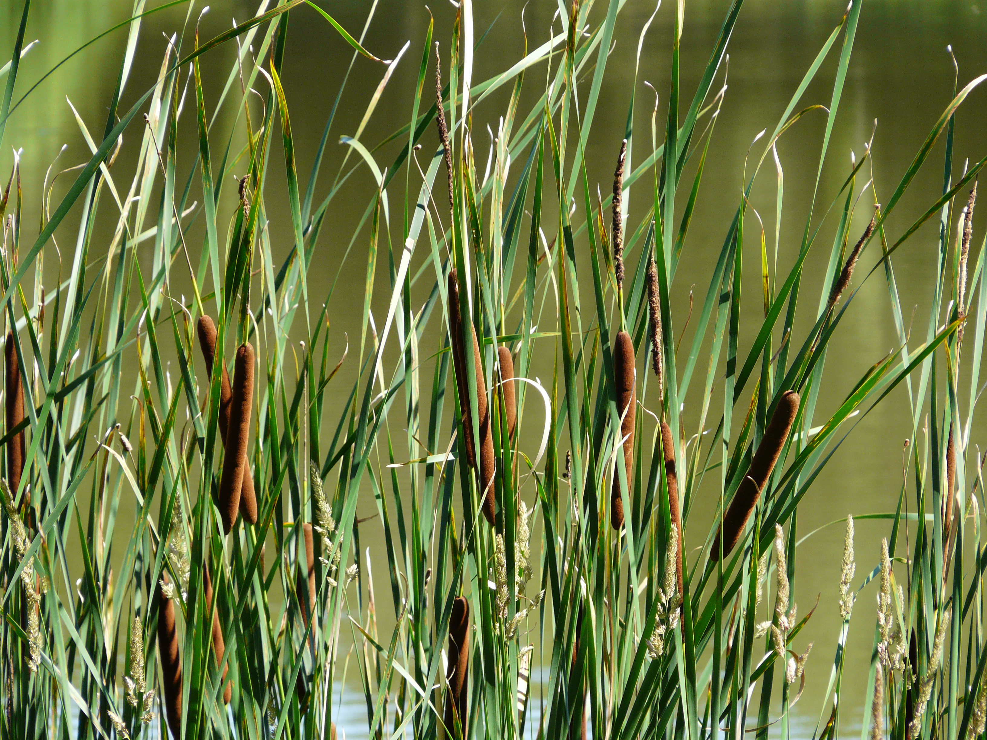 Massettes à larges feuilles (Typha latifolia), Dordogne, France.